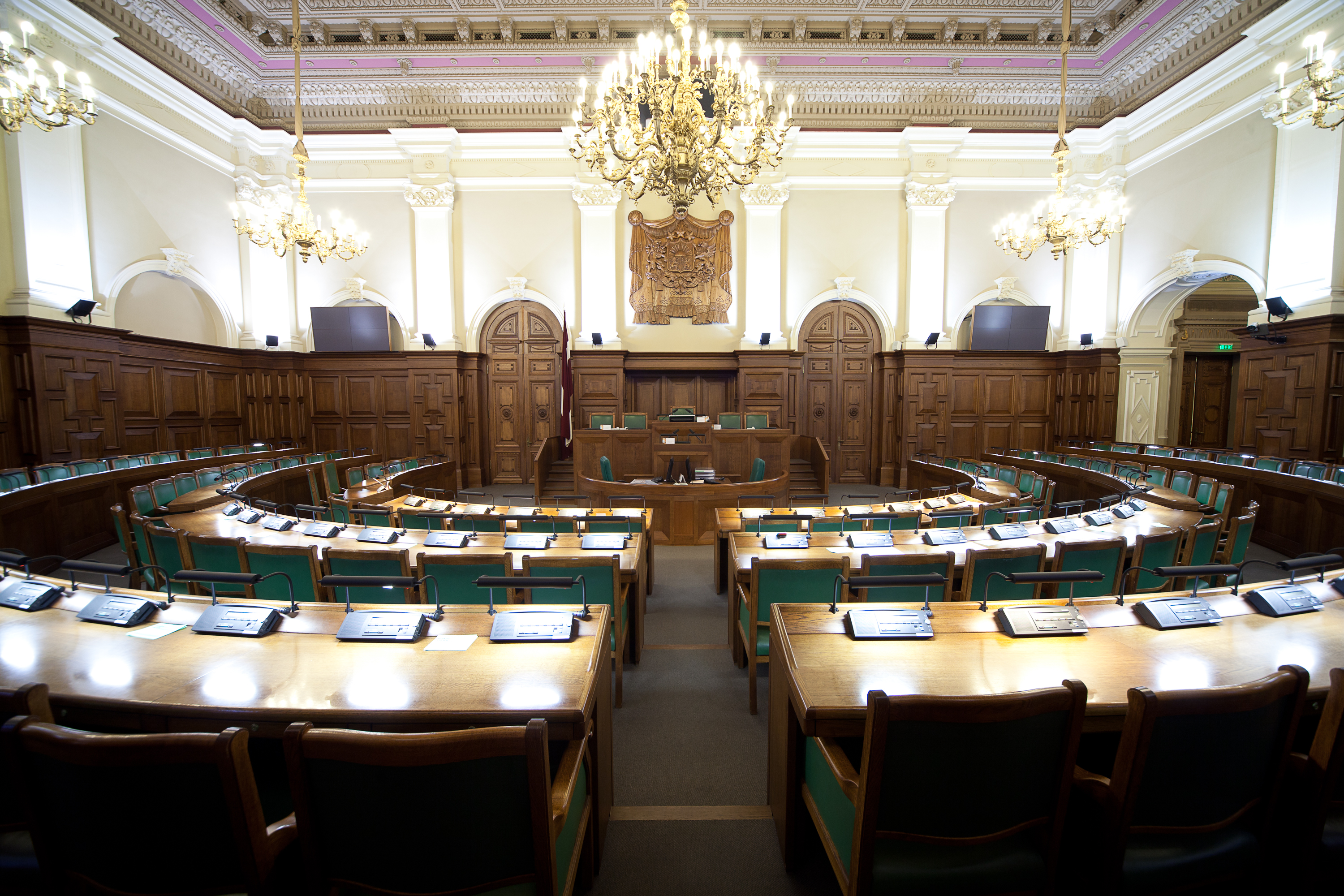 Saeimas sēžu zāle Foto: Ernests Dinka, Saeimas Kanceleja